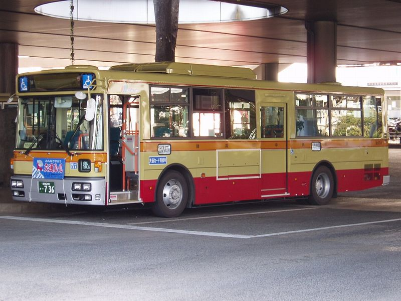 Kanachu A174（あ174） Nissan Diesel ADG-RA273MAN at Atsugi Bus Center